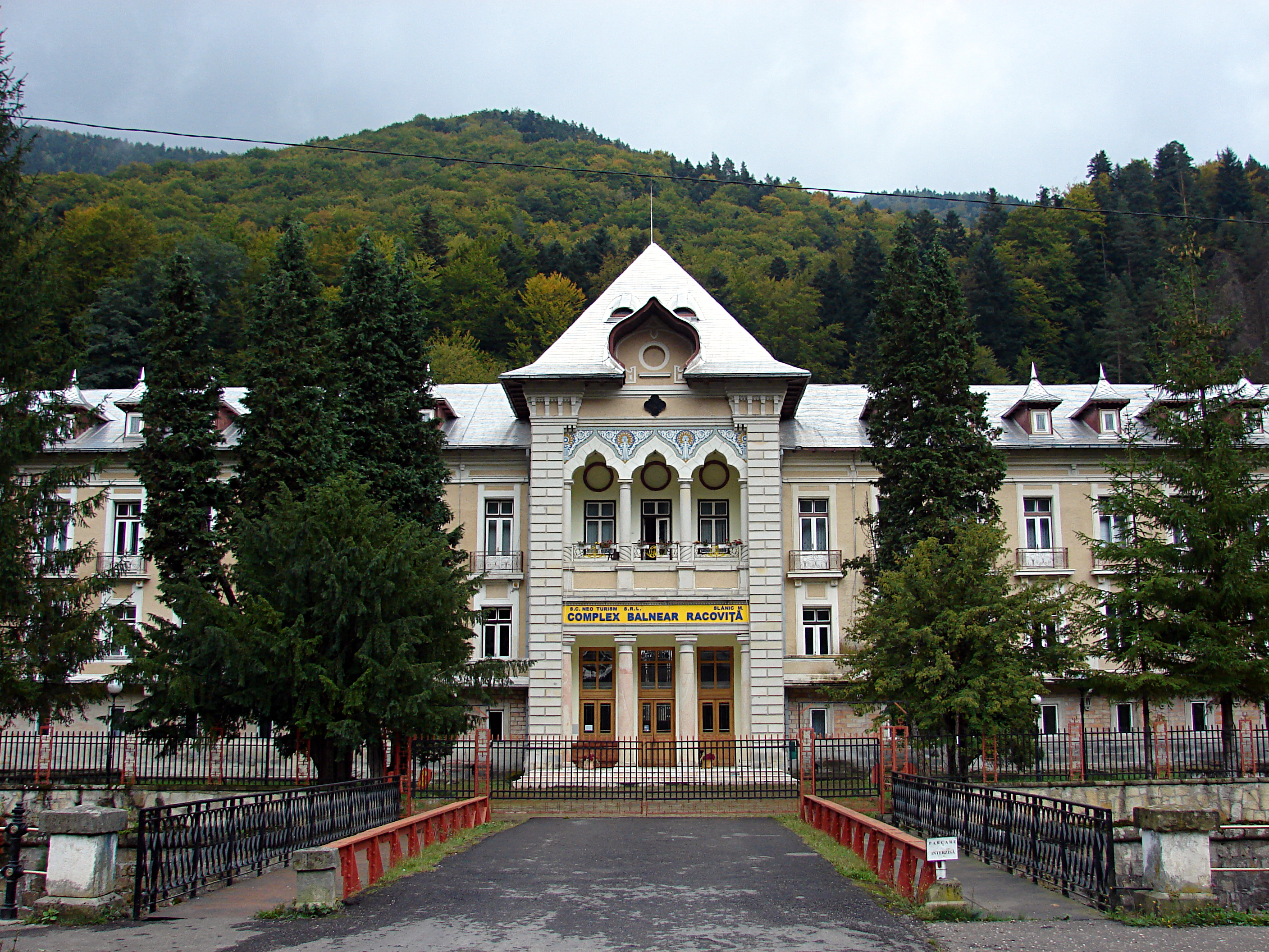 Slănic Moldova, Complexul balnear Racoviță